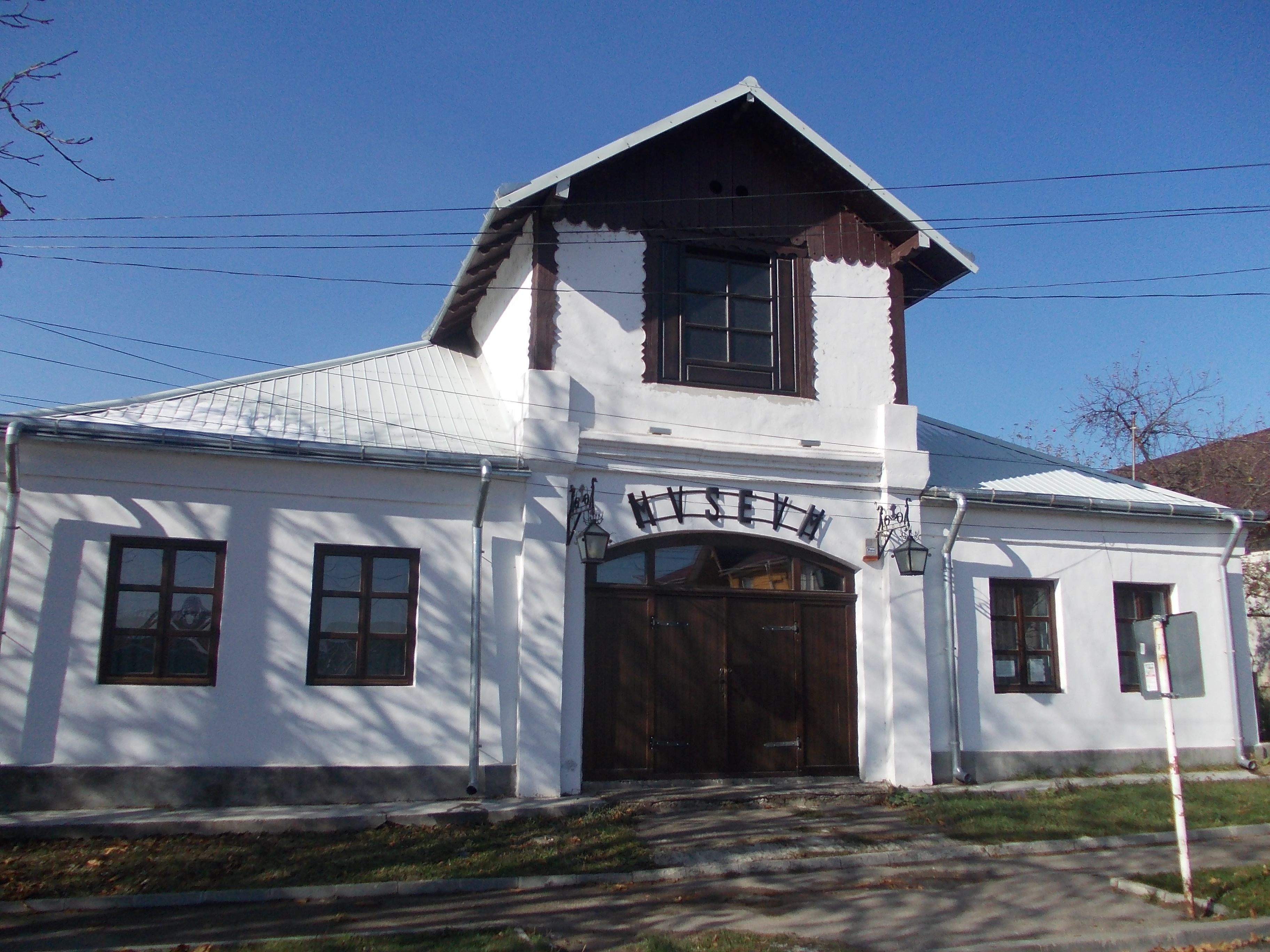 Muzeul Săveni Bt